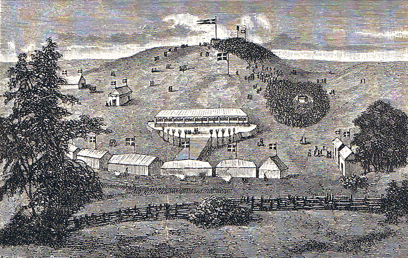 Skamlingsbanken 18. maj 1843